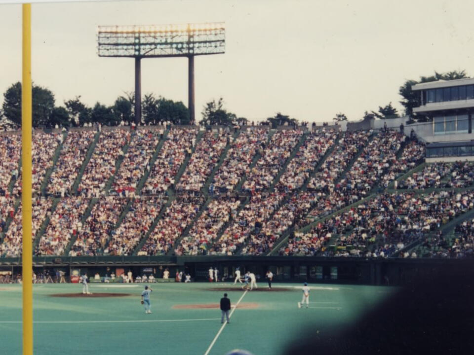 現在の「西武ドーム」の、屋根部分がない時代の写真。１９９３年１０月２３日、日本シリーズ第１戦（西武－ヤクルト）にて。 35mmフィルムで撮影し印画紙プリントしてあったものを、スキャナーにて取り込み、jpgデータにしたものです。